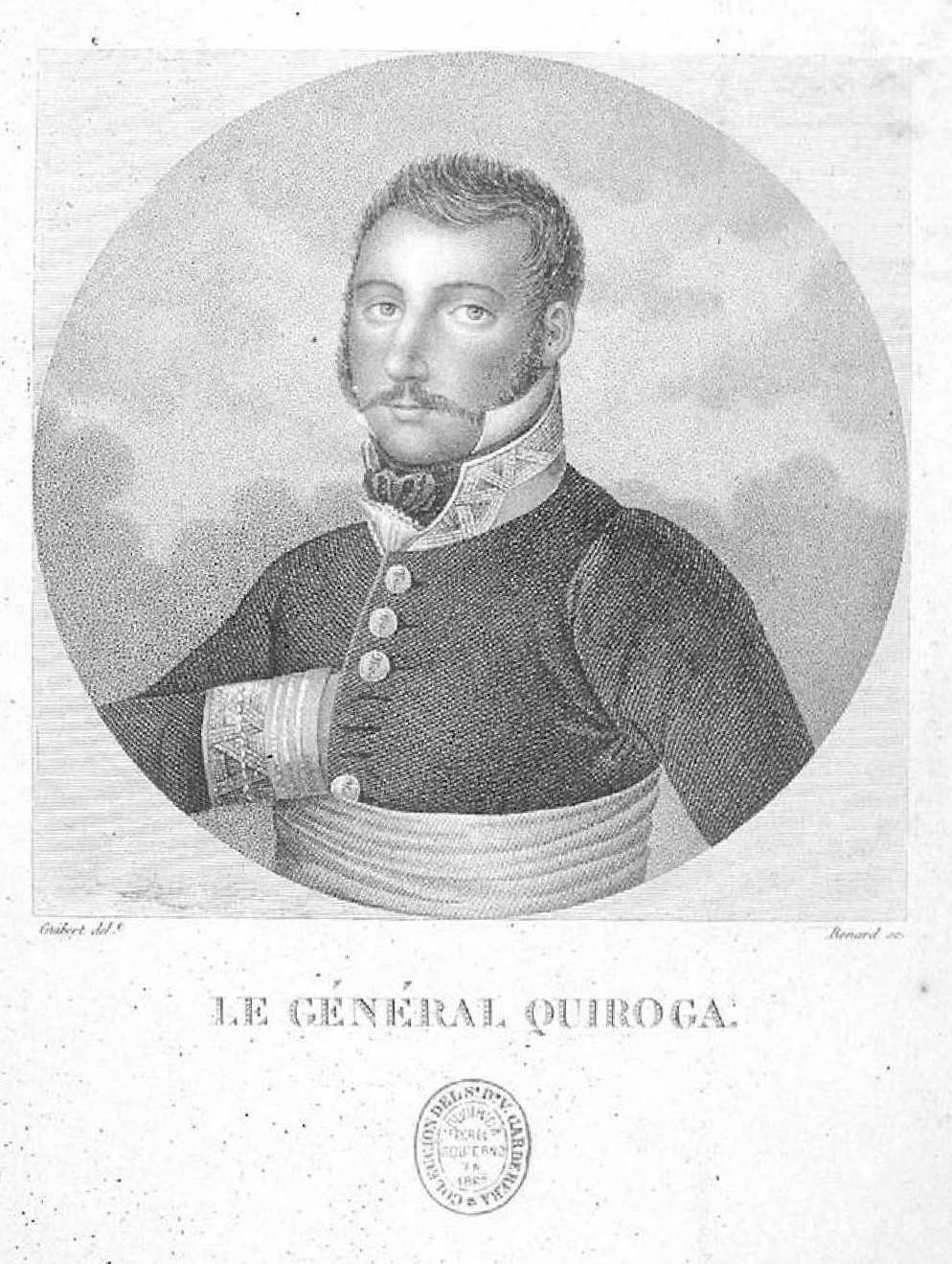 Antonio Quiroga, grabado francés firmado por Guibert como dibujante y Renard como editor, A Paris. Chez l'auteur Rue des Francs Bourgeois. Biblioteca Nacional de España